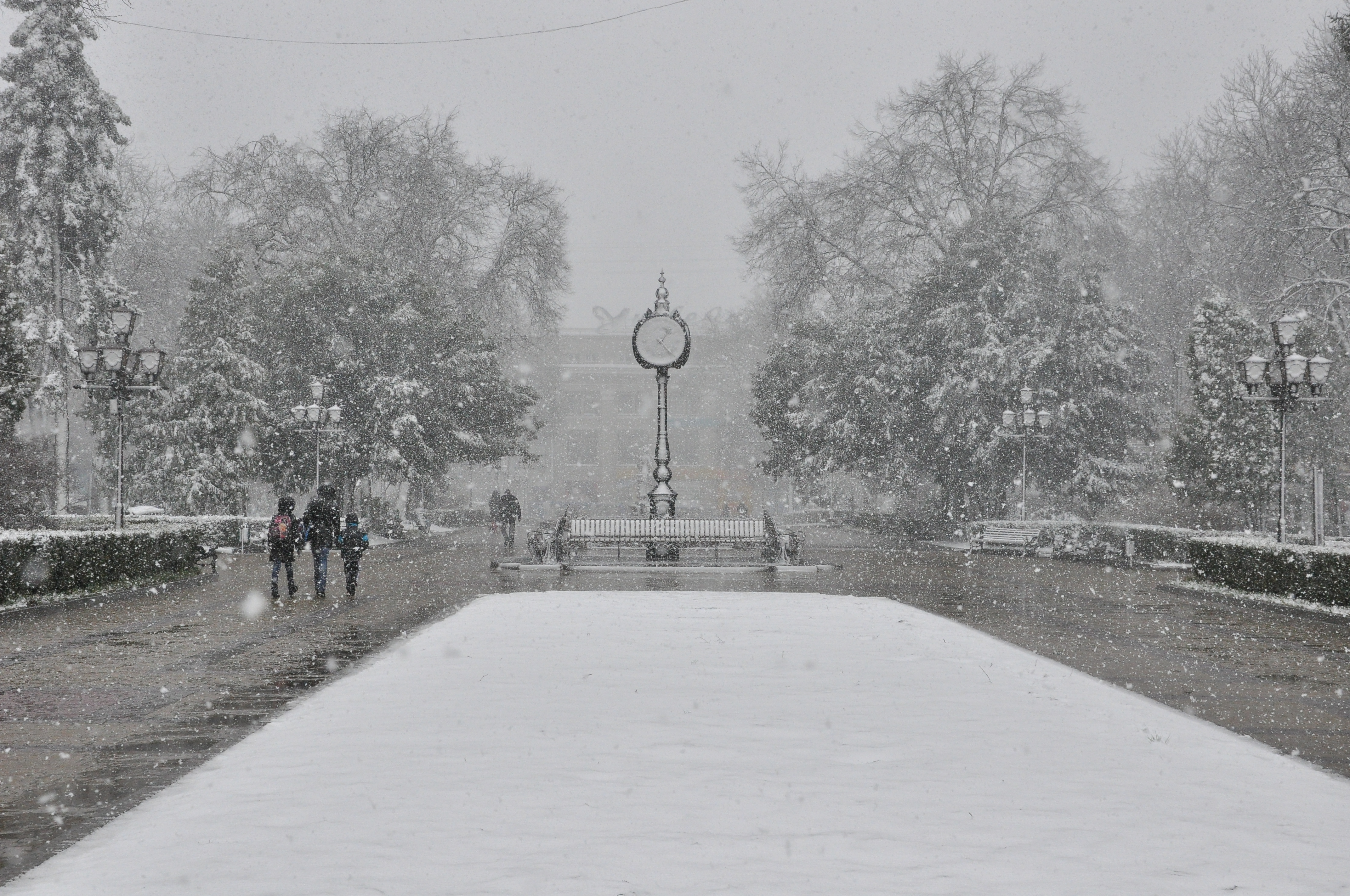 Парк-пам'ятка садово-паркового мистецтва місцевого значення «Сквер ім. Шевченка» у м. Тернополі на бульварі Тараса Шевченка, між музично-драматичним театром та центральним універмагом. Квітнева снігова завія.